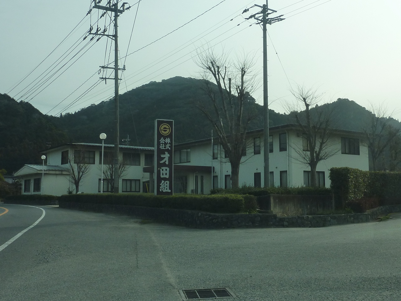 才田組朝倉支店。サイタホールディングスの本社所在地。